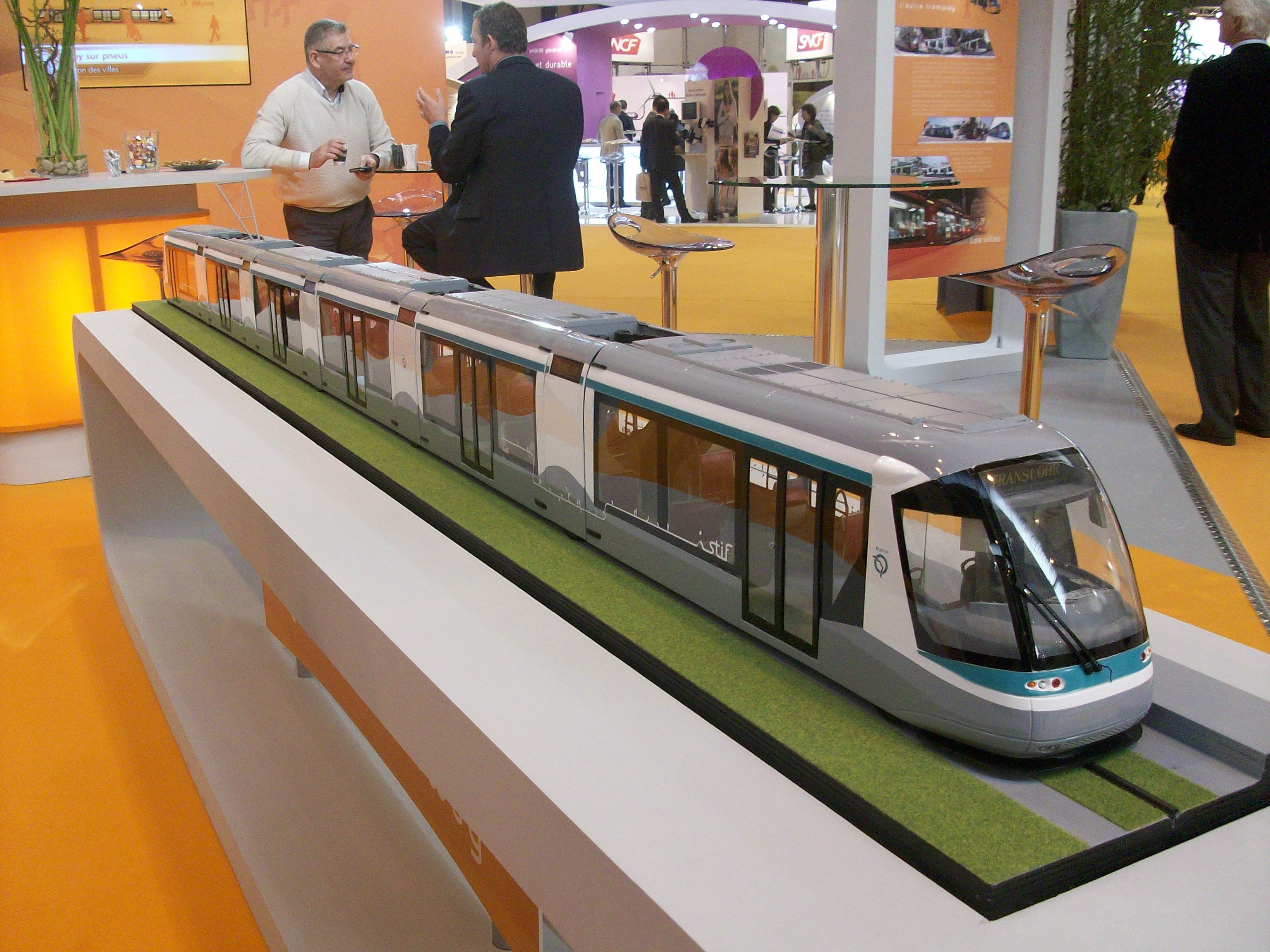 Maquette du Translohr STE6 destiné à la ligne T6 RATP, exposé aux 23e RNTP, Strasbourg